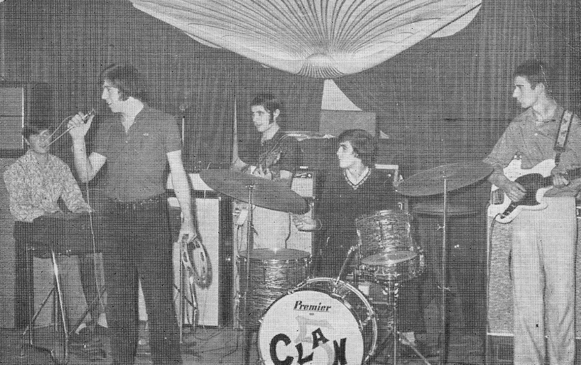 Clan 5